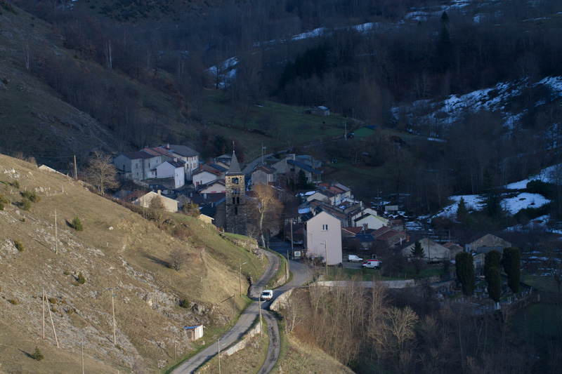 Vue globae de Caussou